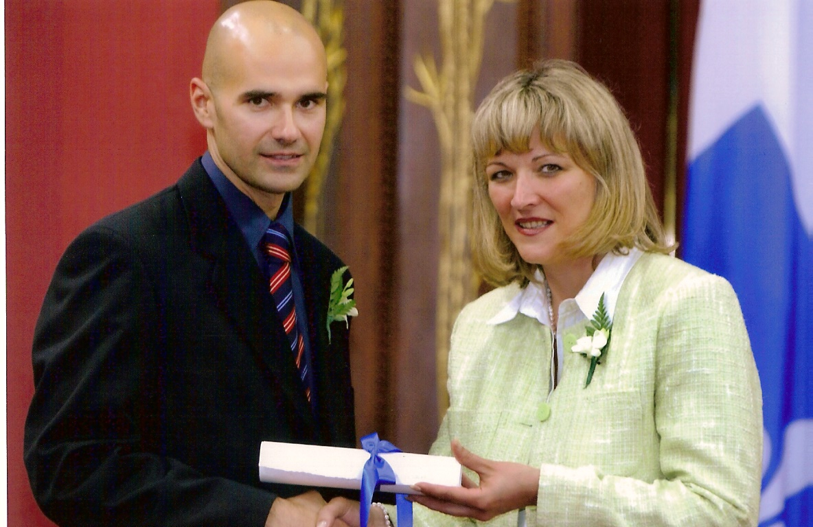 Dave Blackburn et la ministre de l'Immigration et des Communautés culturelle, Mme Lise Thériault